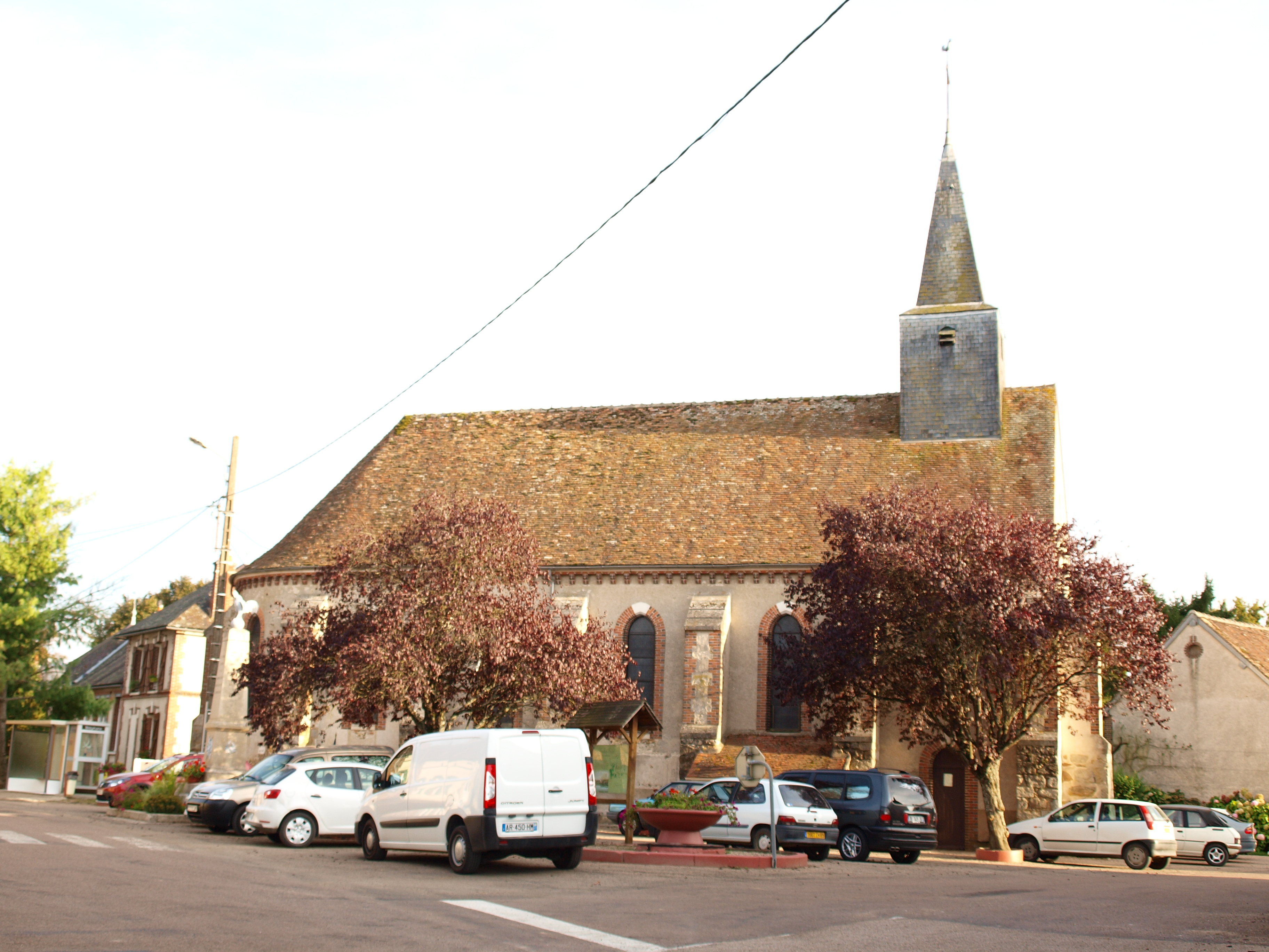 Marchais-Beton (Yonne, France) ; église